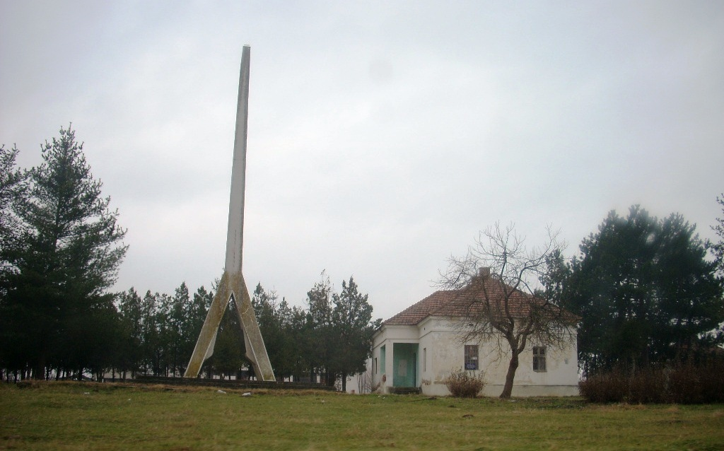 Donje Konjuvce, Bojnik